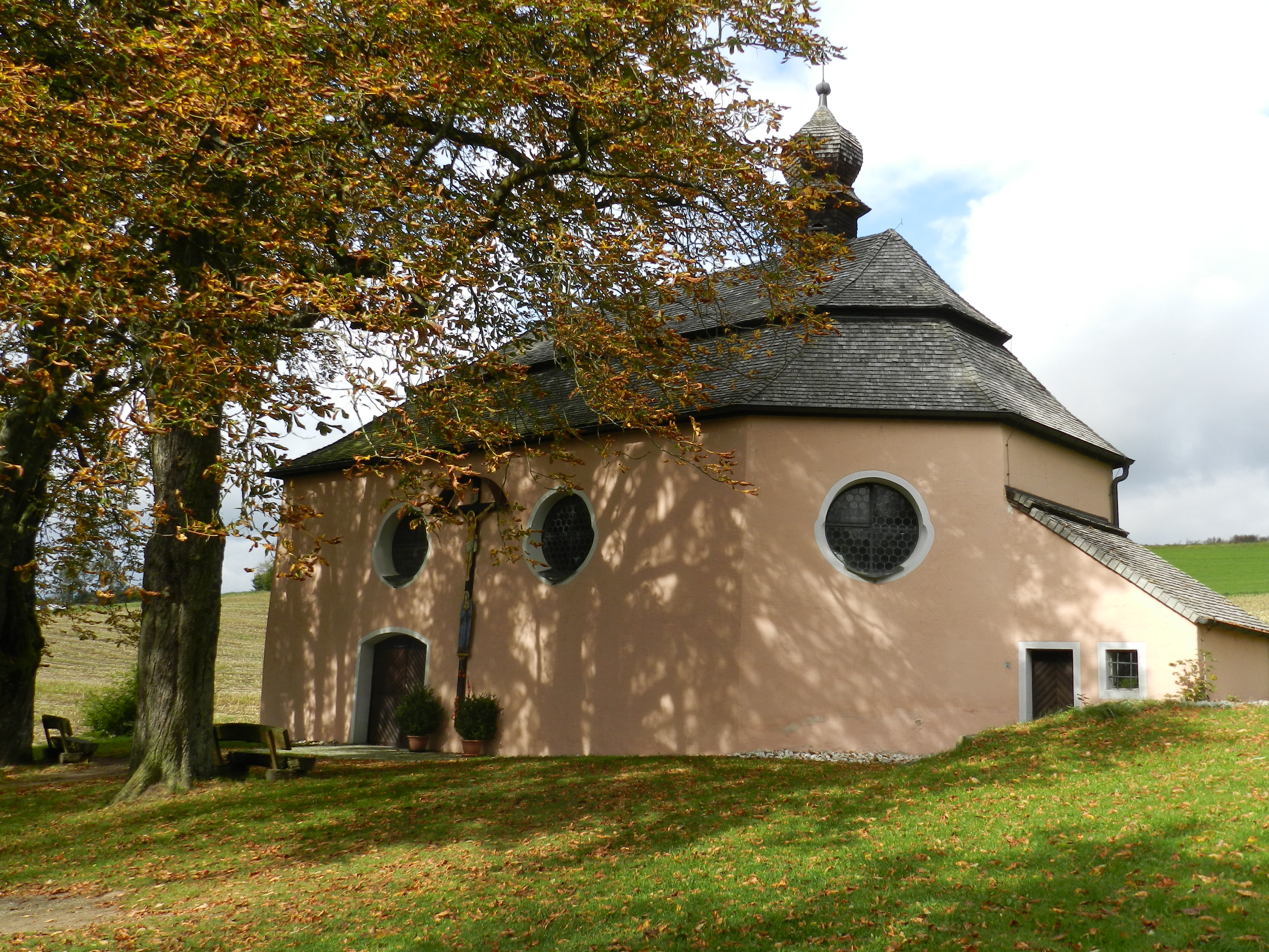 Jakobikirche in Fuchsberg, Gemeinde Teunz, Landkreis Schwandorf, Oberpfalz, Bayern (2011)